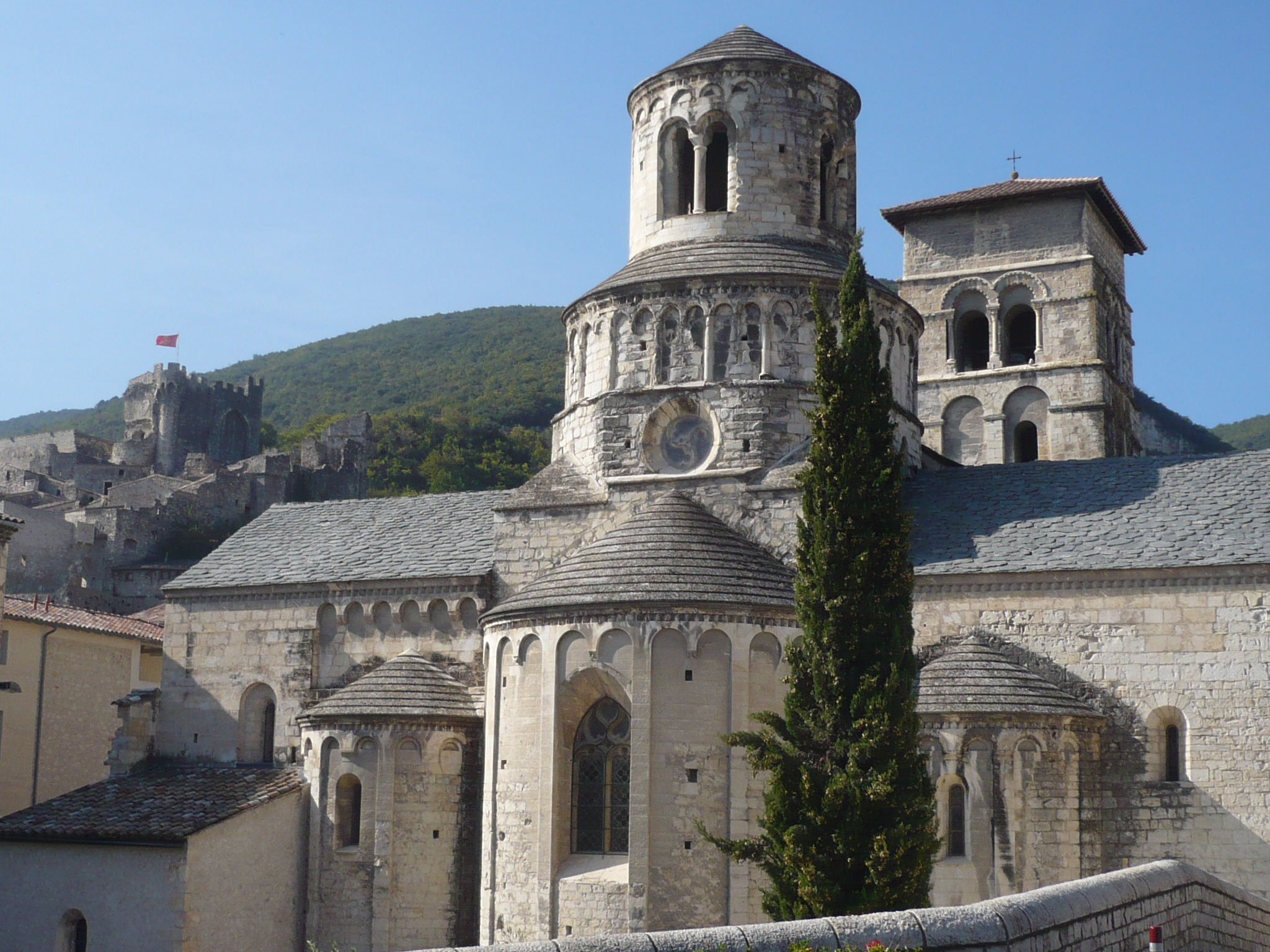 La basilique de Cruas